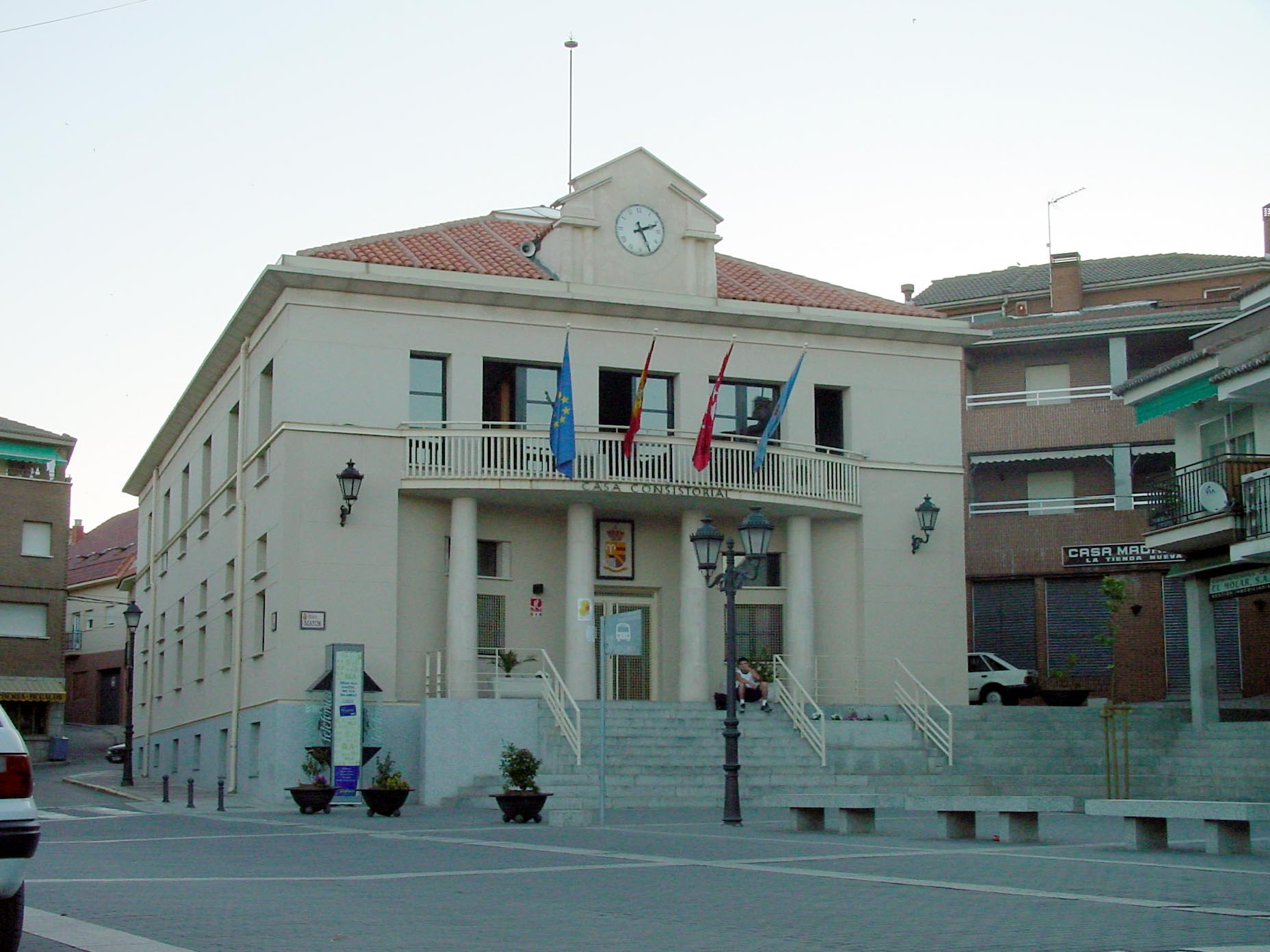 Ayuntamiento de El Molar.